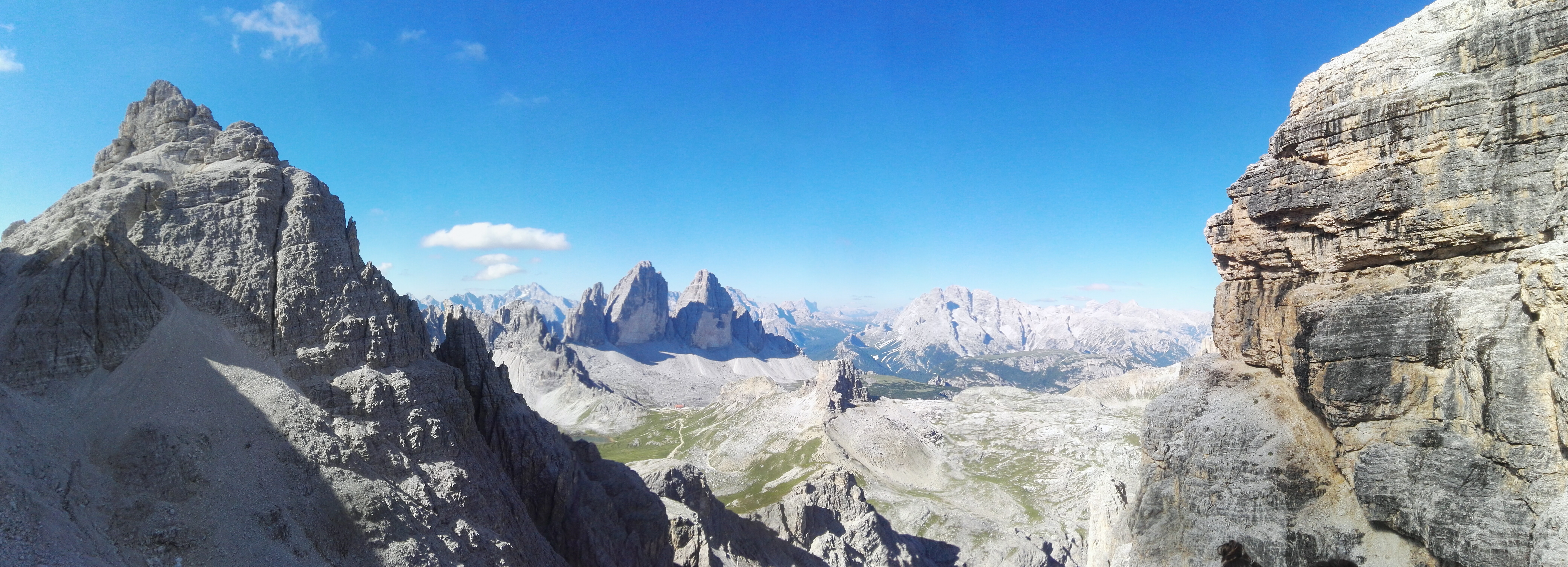 Parco naturale regionale delle Dolomiti d'Ampezzo (Q3895680)